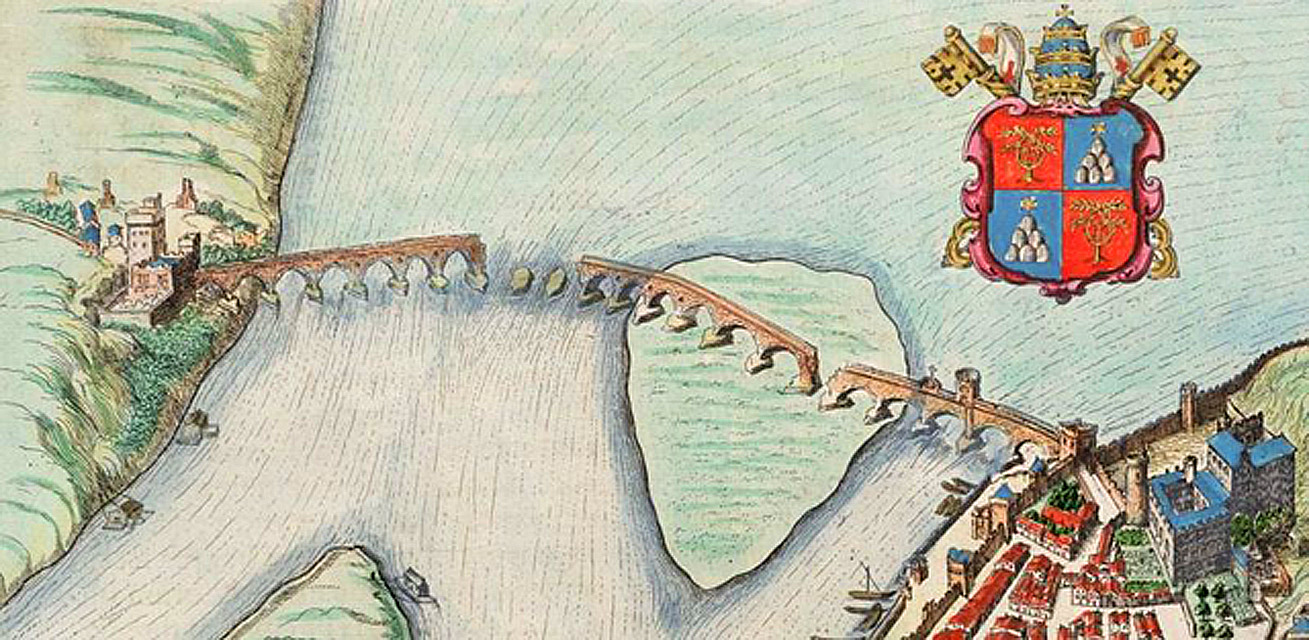 Pont Saint-Bénézet reliant Avignon à Villeneuve